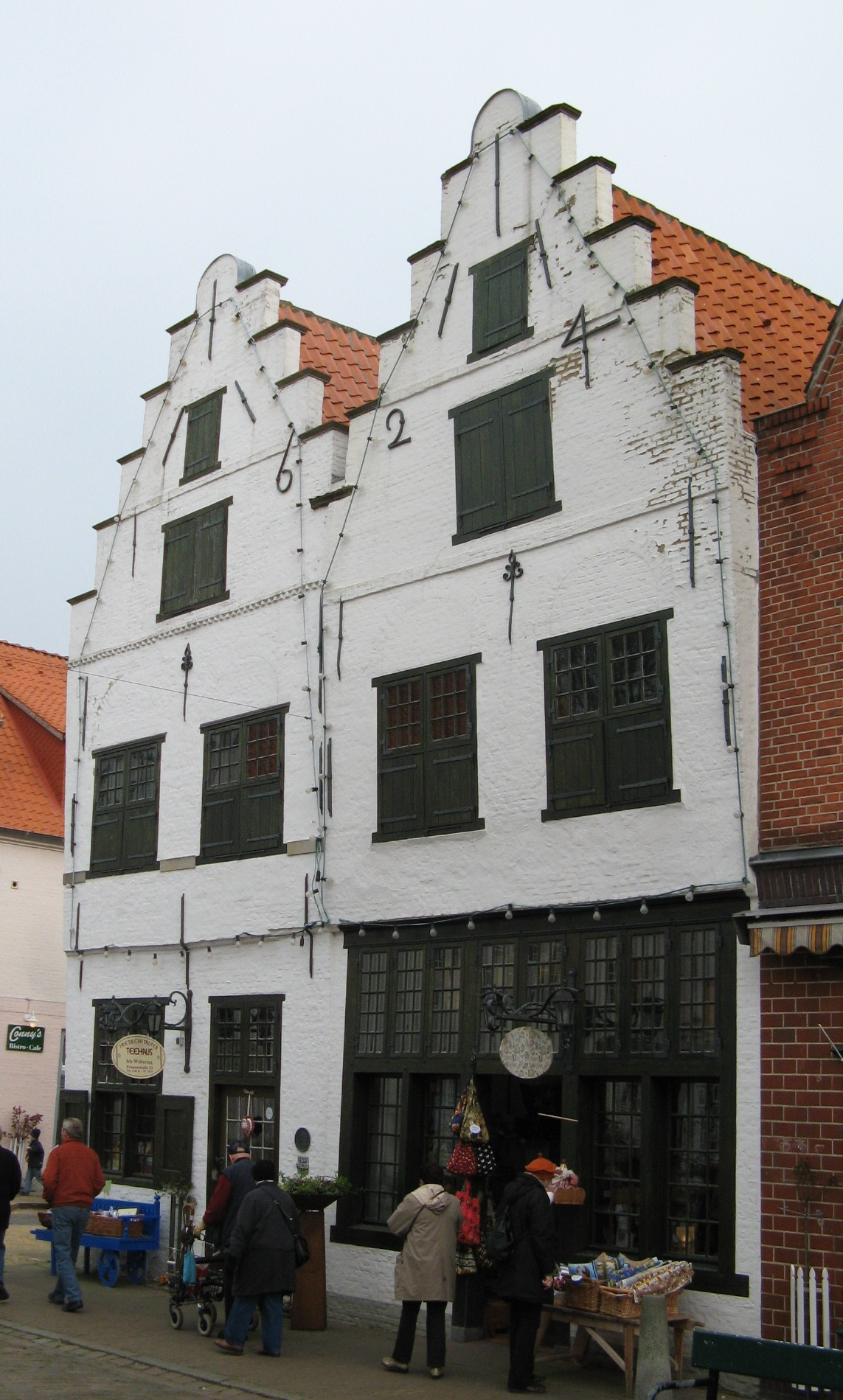 house in Friedrichstadt Author: Dirk Ingo Franke